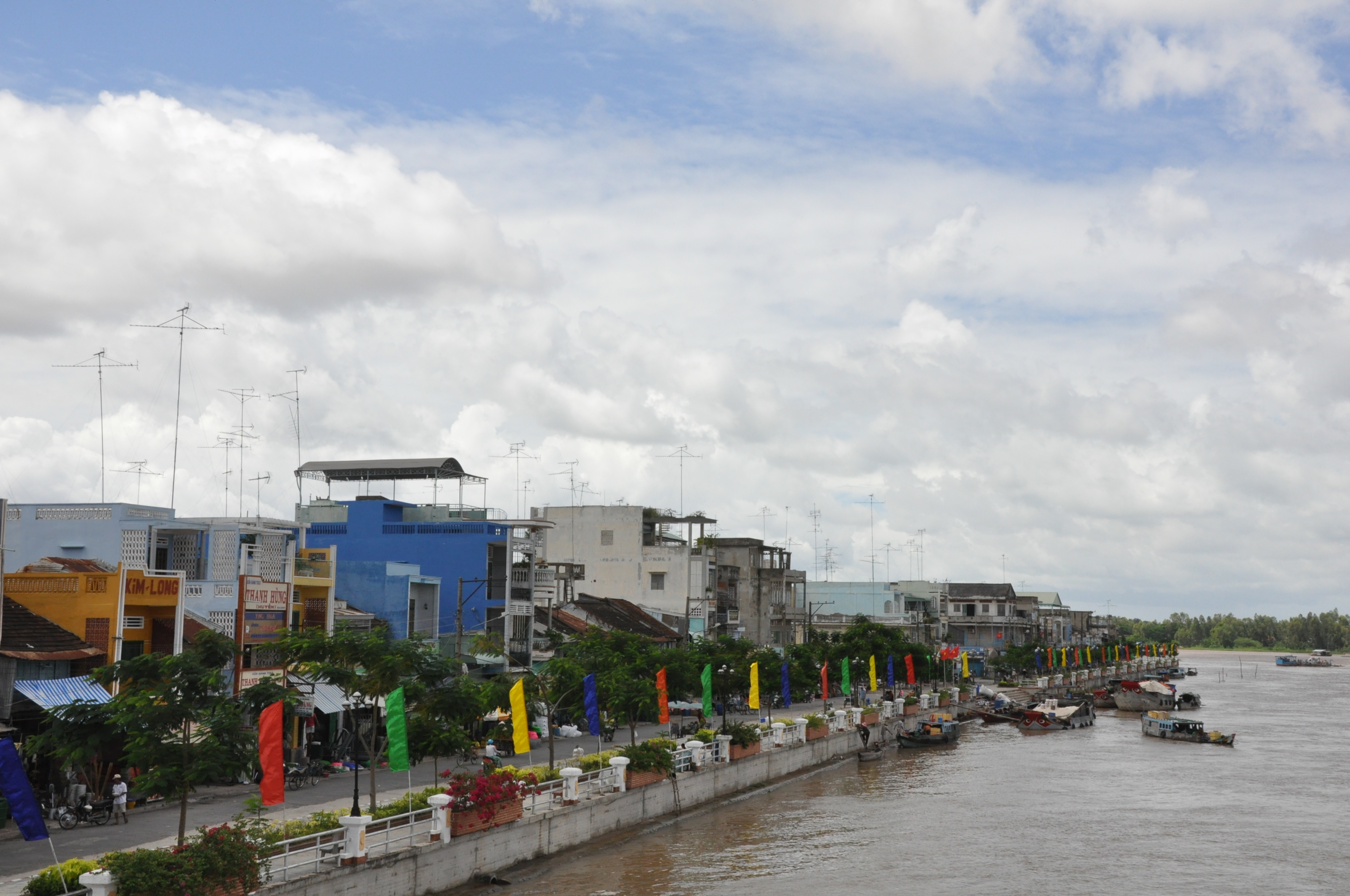 thi xa hong ngu-quoc lo 841, dong thap